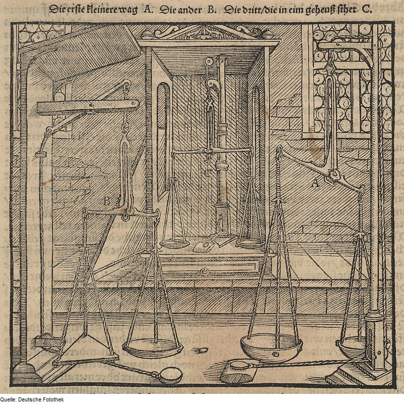 Original image description from the Deutsche Fotothek Bergwerk & Bergbau & Wägetechnik & Waage